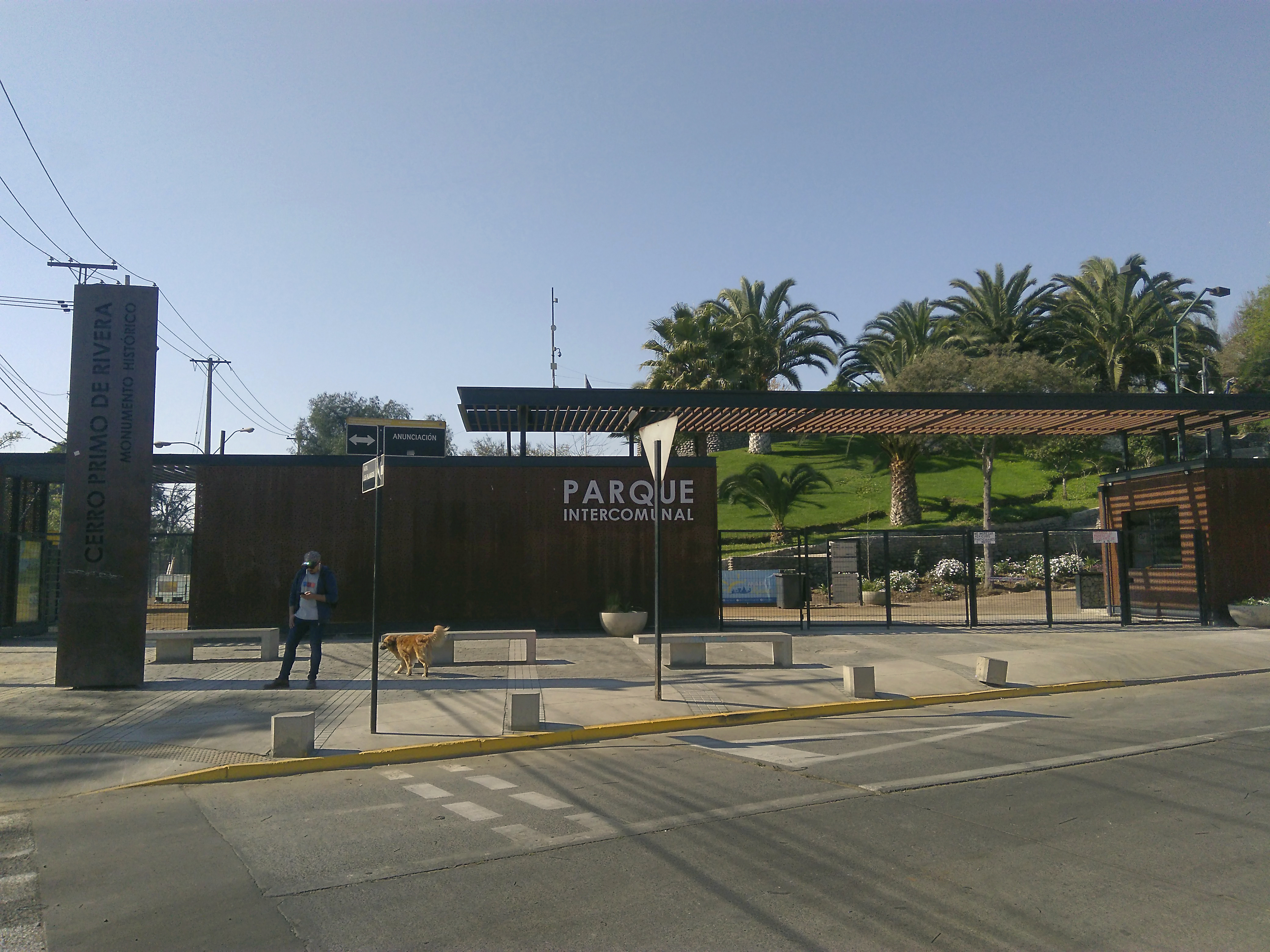 El acceso del parque Cerro Primo de Rivera en la comuna de Maipú, Santiago de Chile.